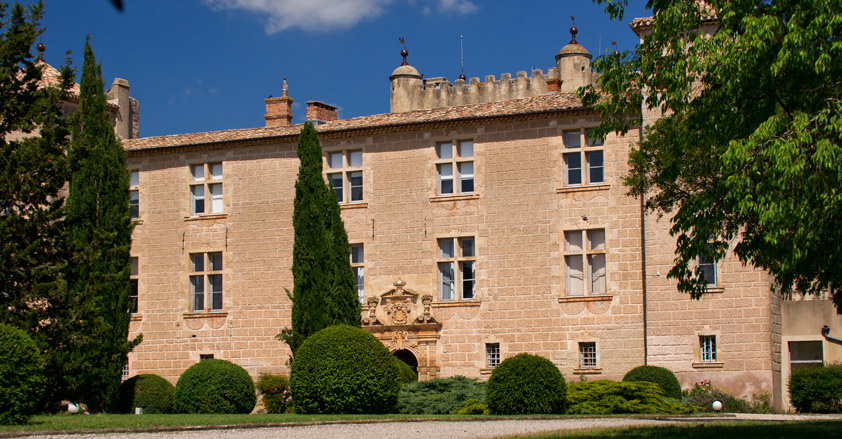 Château de Cambous, (ClasséInscrit, 19831983) .